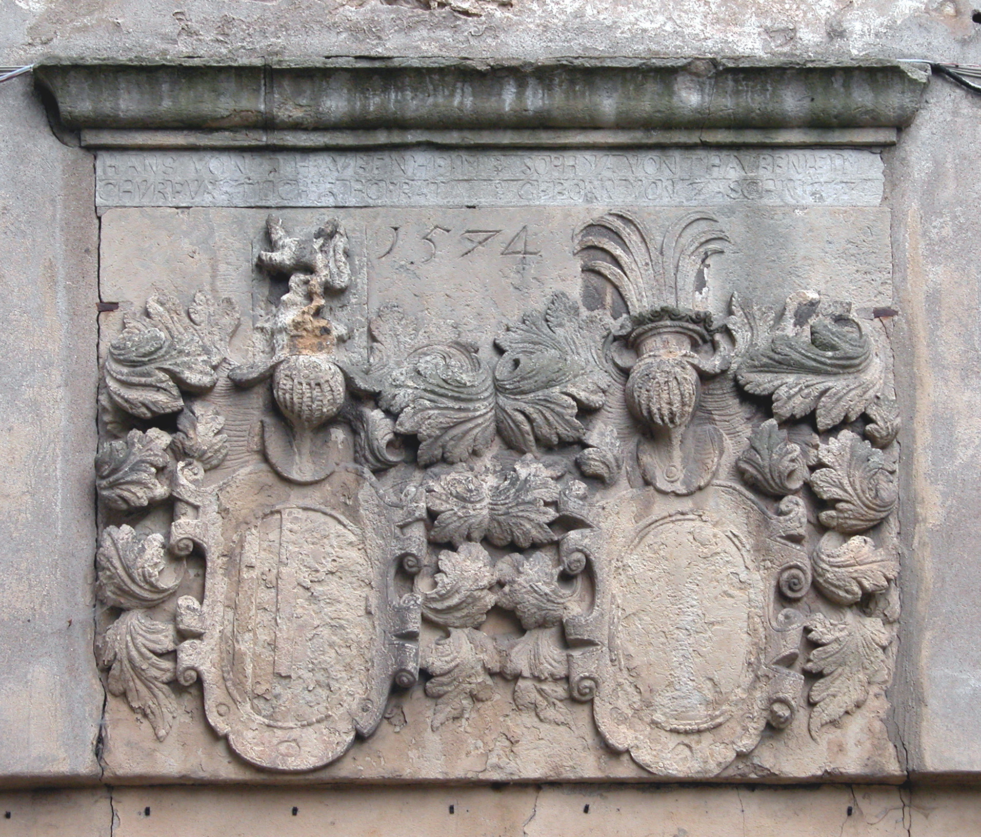 08.08.2006 04749 Noschkowitz (Ostrau): Rittergut. Doppelwappen von 1574 am Torhaus des Schlosses: HANS VON TAUBENHEIM + SOPYA VON TAUBENHEIM CHURFÜRSTLICHER HOFRAT GEBORENE VON ZASCHNITZ [DSCN11014.JPG]20060808395.DR.JPG(c)Blobelt